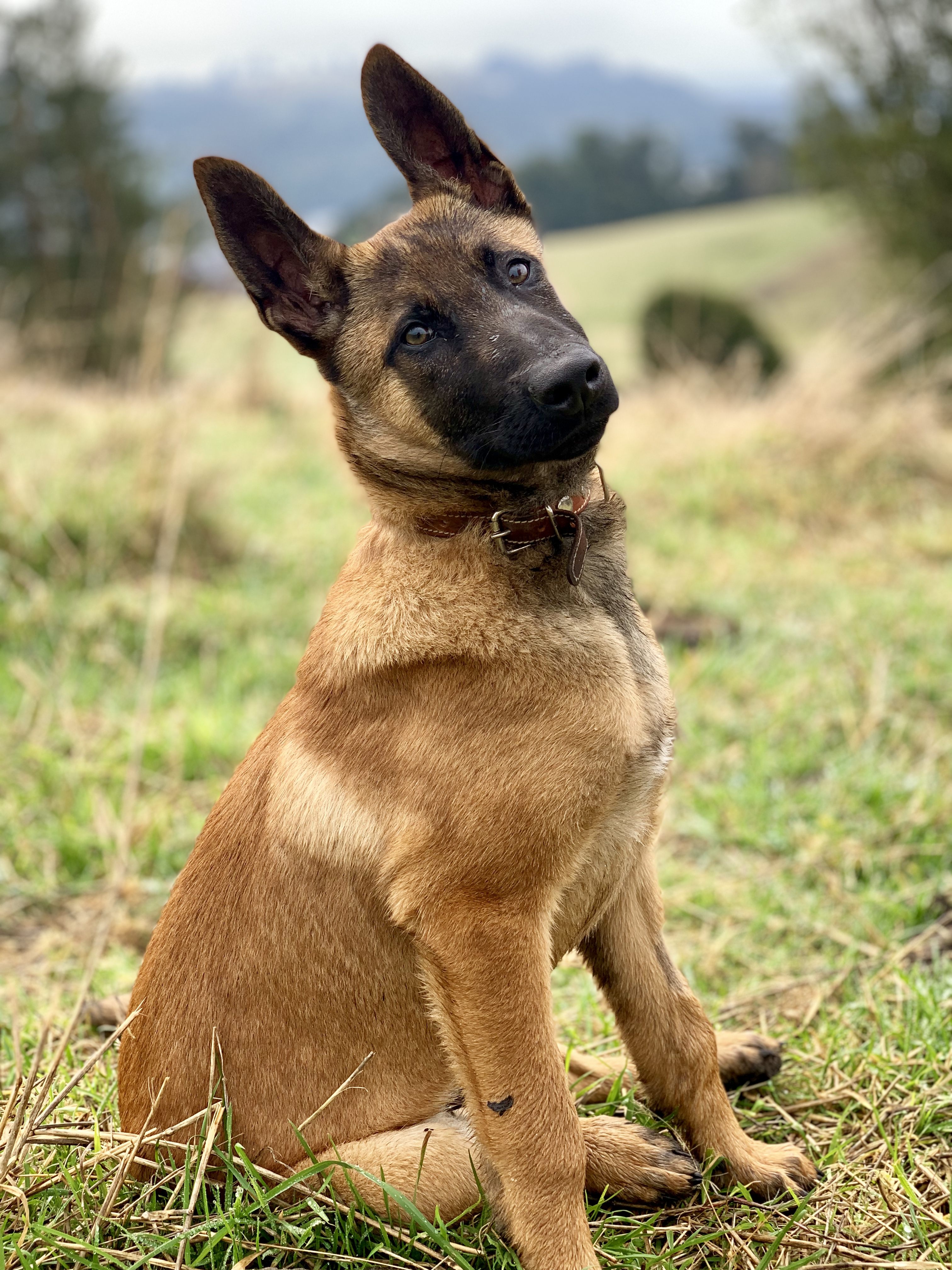 Un pastor belga malinois macho de cuatro meses de edad.